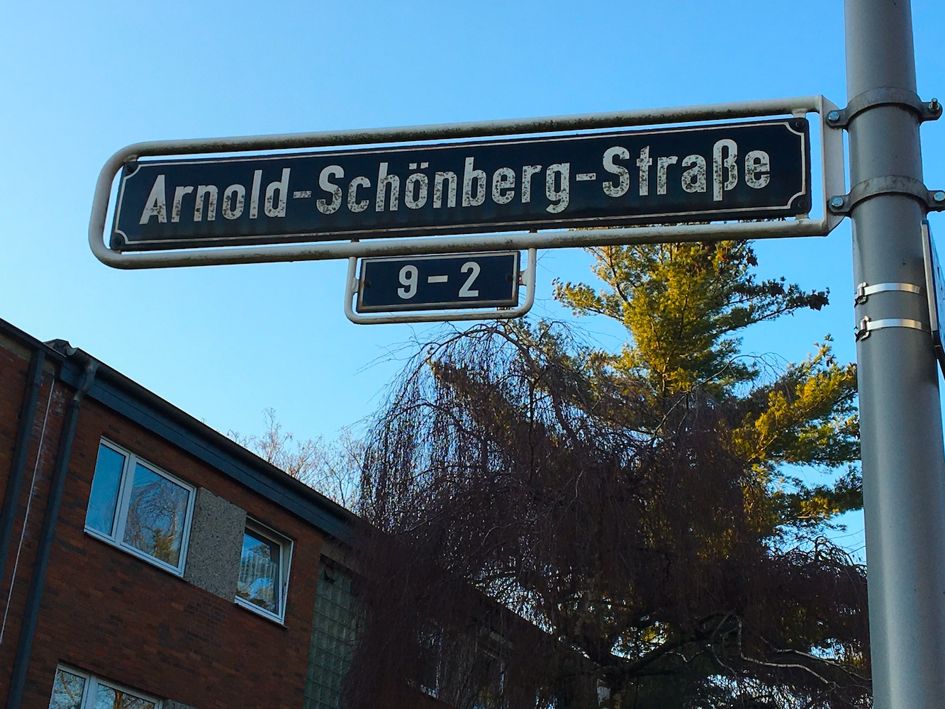 Улица Арнольда Шёнберга в Урденбахе (Дюссельдорф). 14 февраля 2017.